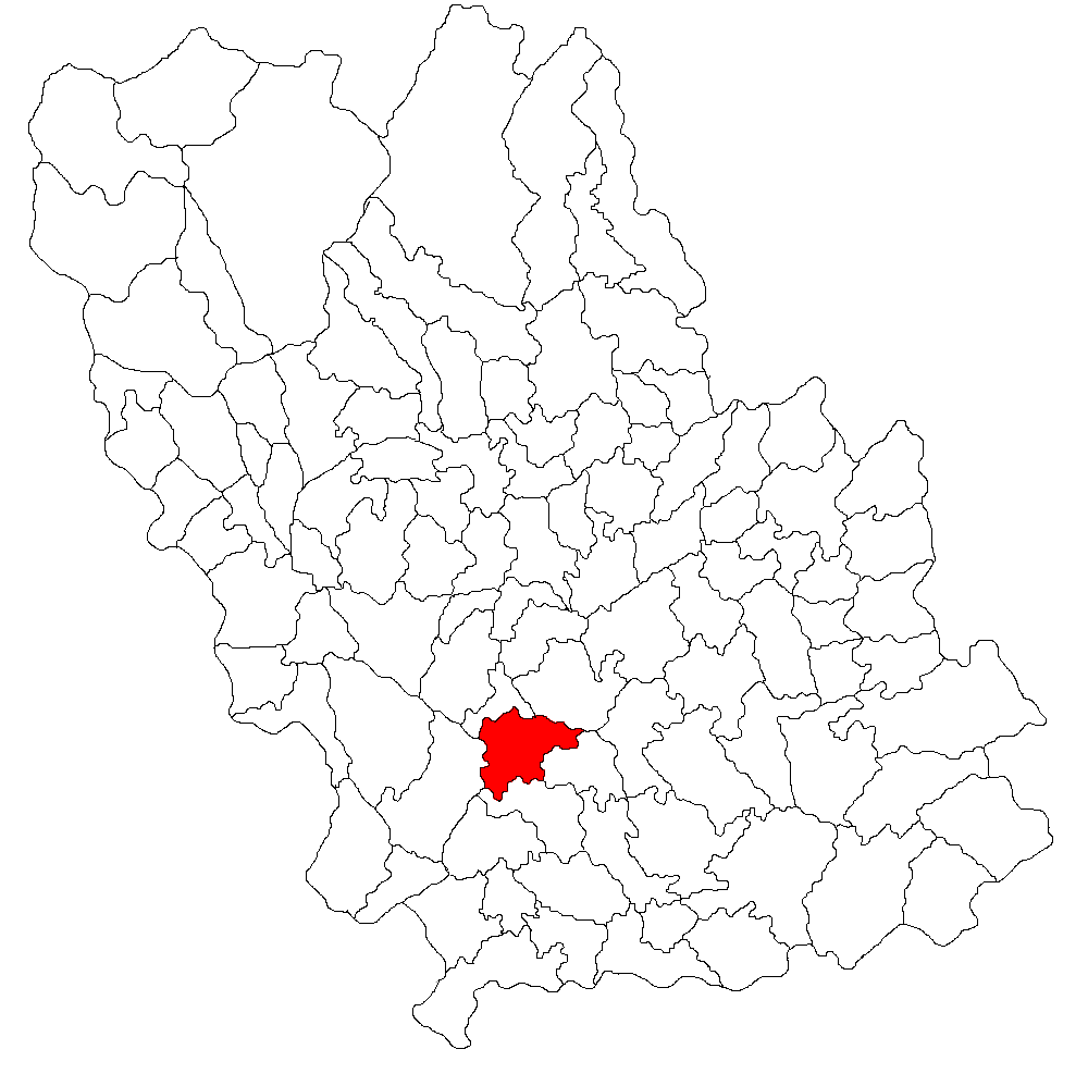 Categorie:Hărţi ale judeţului Prahova